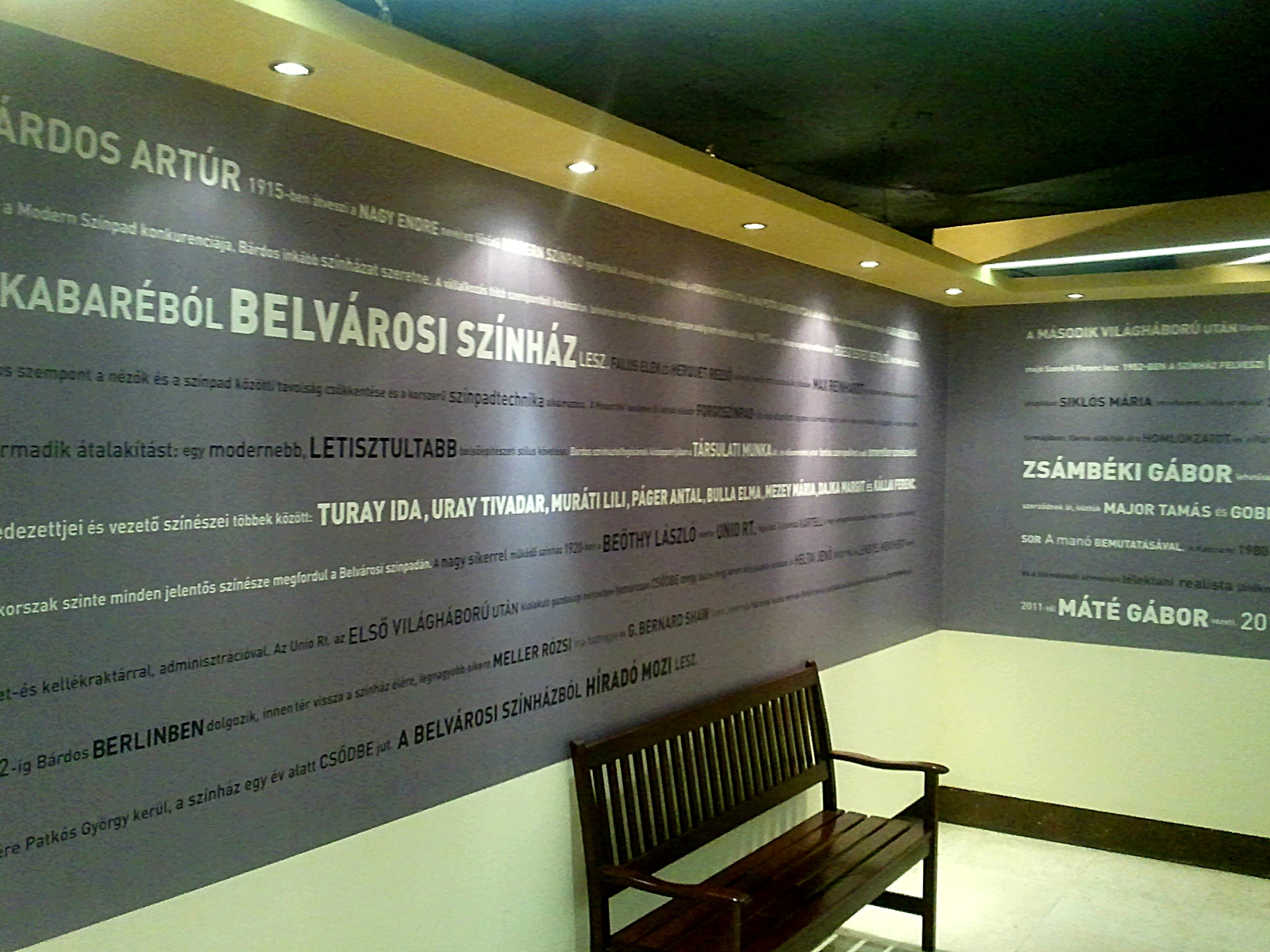 A Belváros Színház emlékfala. A Katona József Színház alagsori közösségi tere. Néhány hónappal később átépítették.